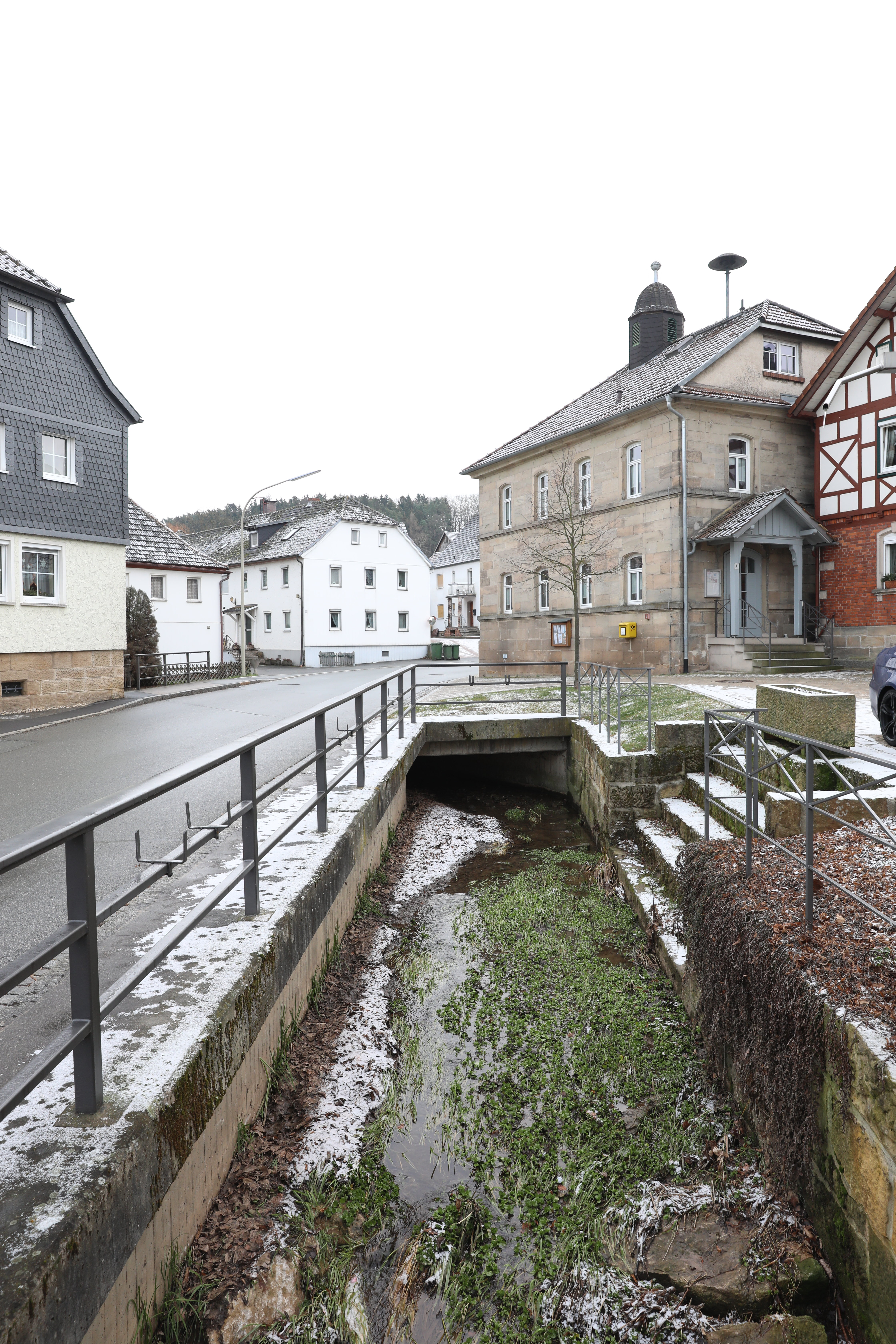 Krebsbach in Beikheim